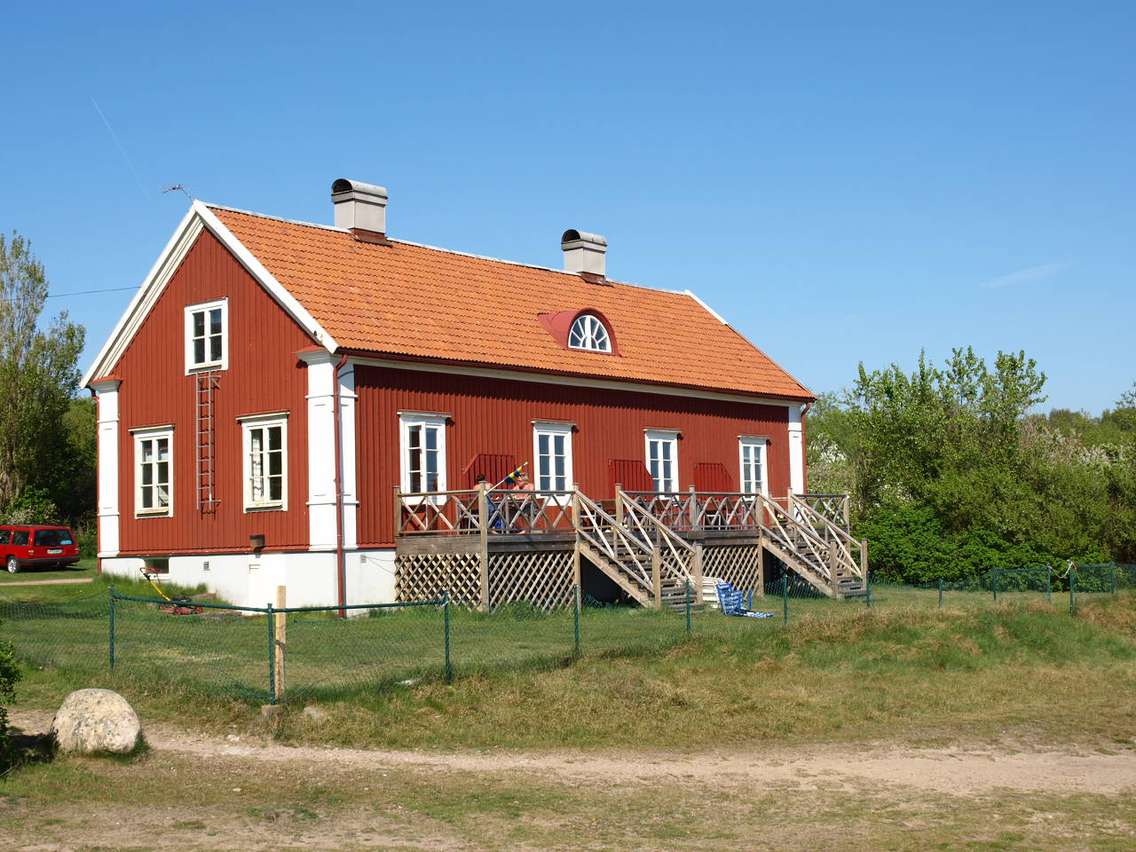 Tjuvahålans tullstation